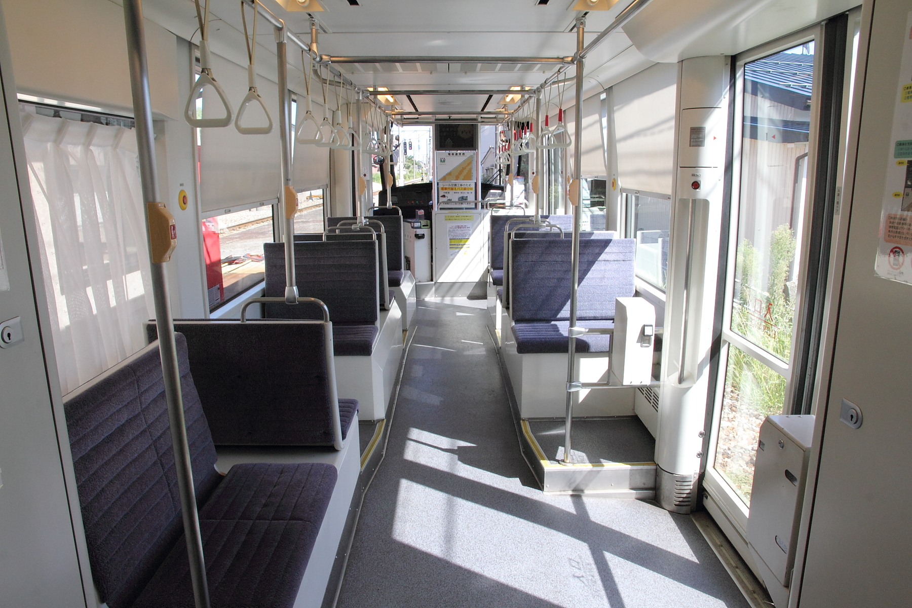 万葉線MLRV1000形1006Aの車内。連結部側から運転台側に向って撮影。